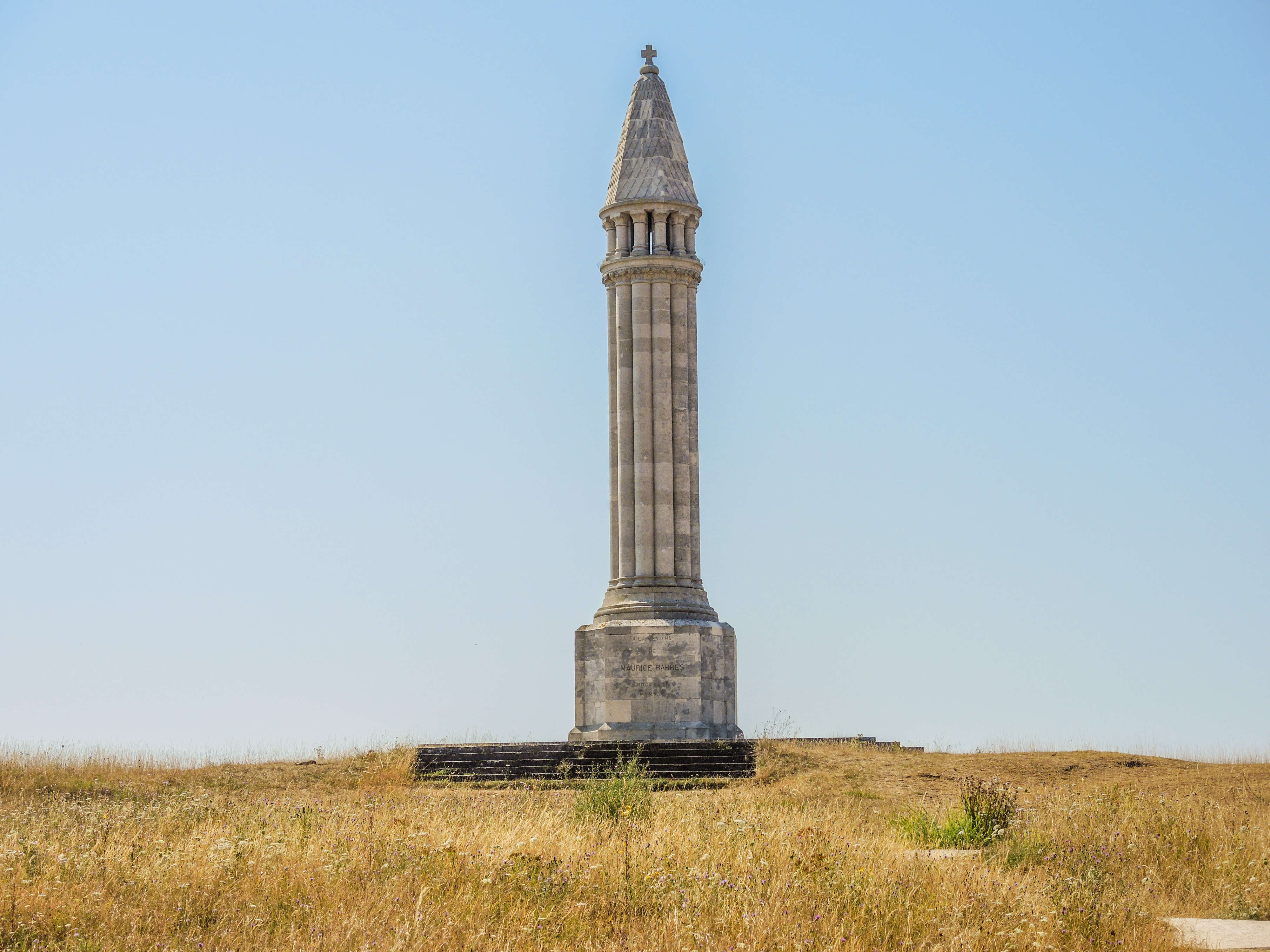 Monument Barrès. Vaudémont. Meurthe-et-Moselle